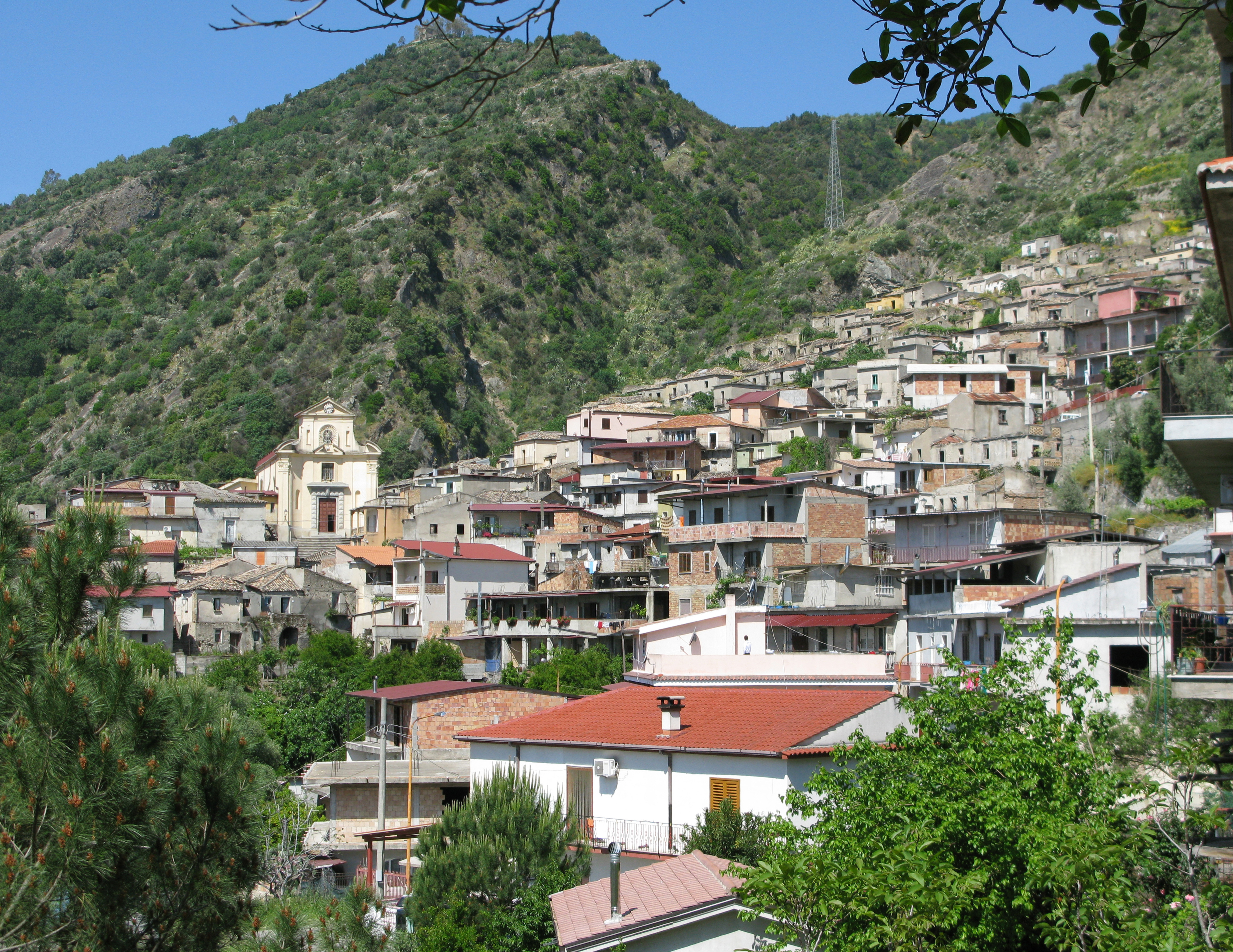 San Luca